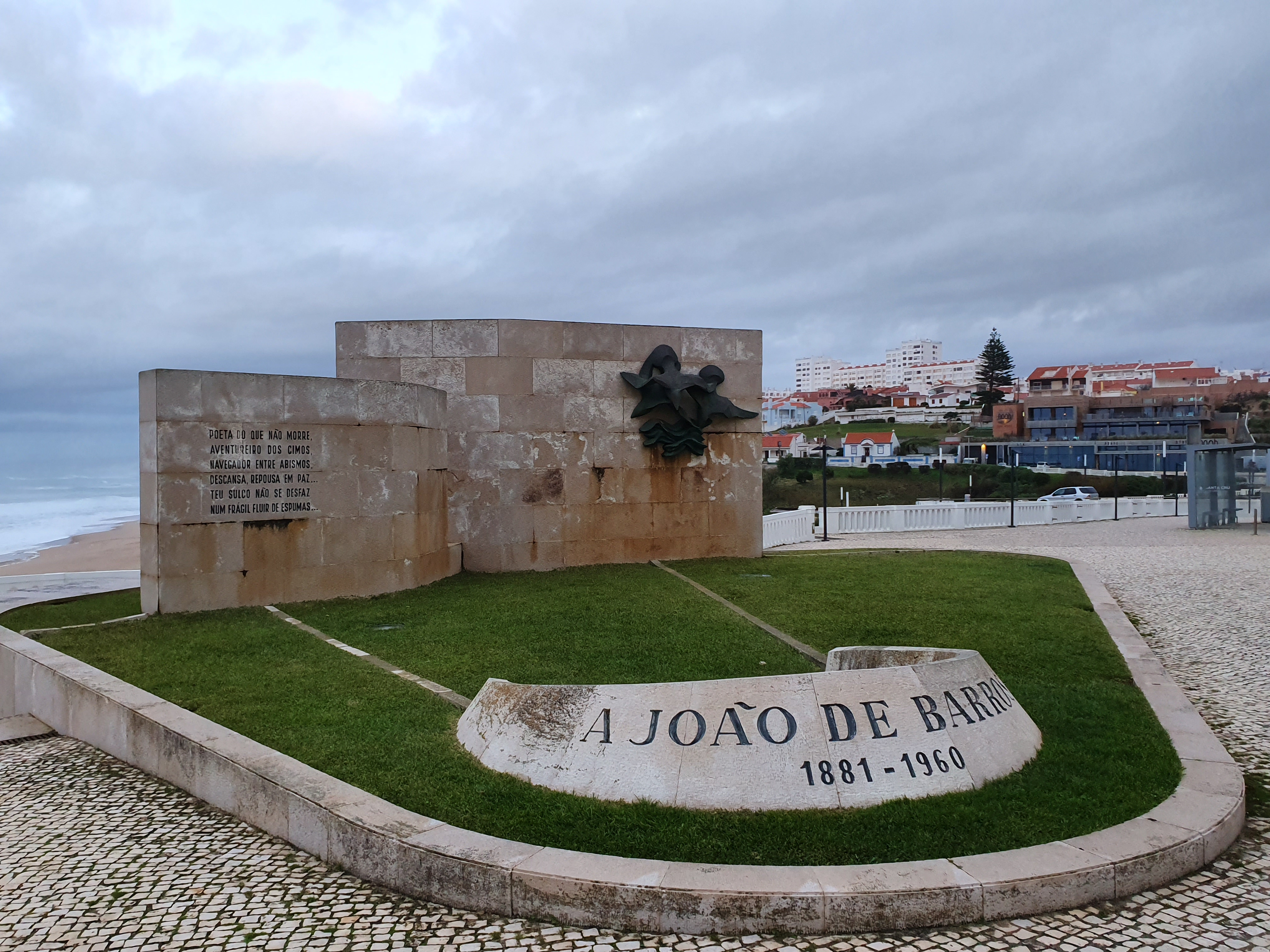 Monumento a João de Barros, em Santa Cruz, inaugurado em 1971, da autoria de José Santa Bárbara (escultor) e de Keil do Amaral (arquiteto). Inscrição: "Poeta do que não morre, / Aventureiro dos cimos, / Navegador entre abismos, / Descansa, repousa em paz.../ Teu sulco não se desfaz / Num frágil fluir de espumas..."